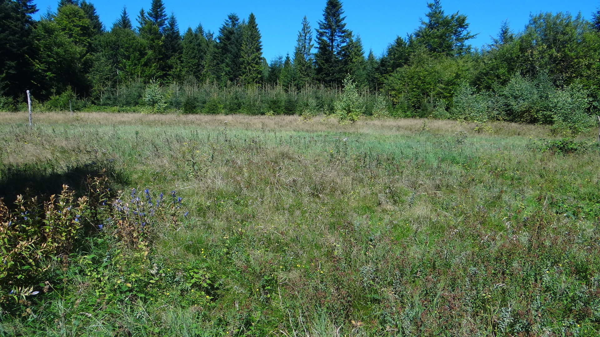 Polana Zawadówka na Łopieniu